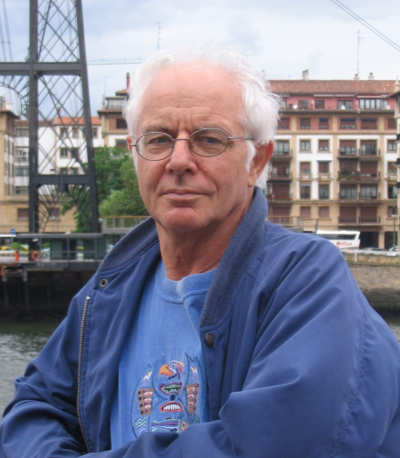 Bertrand Méheust